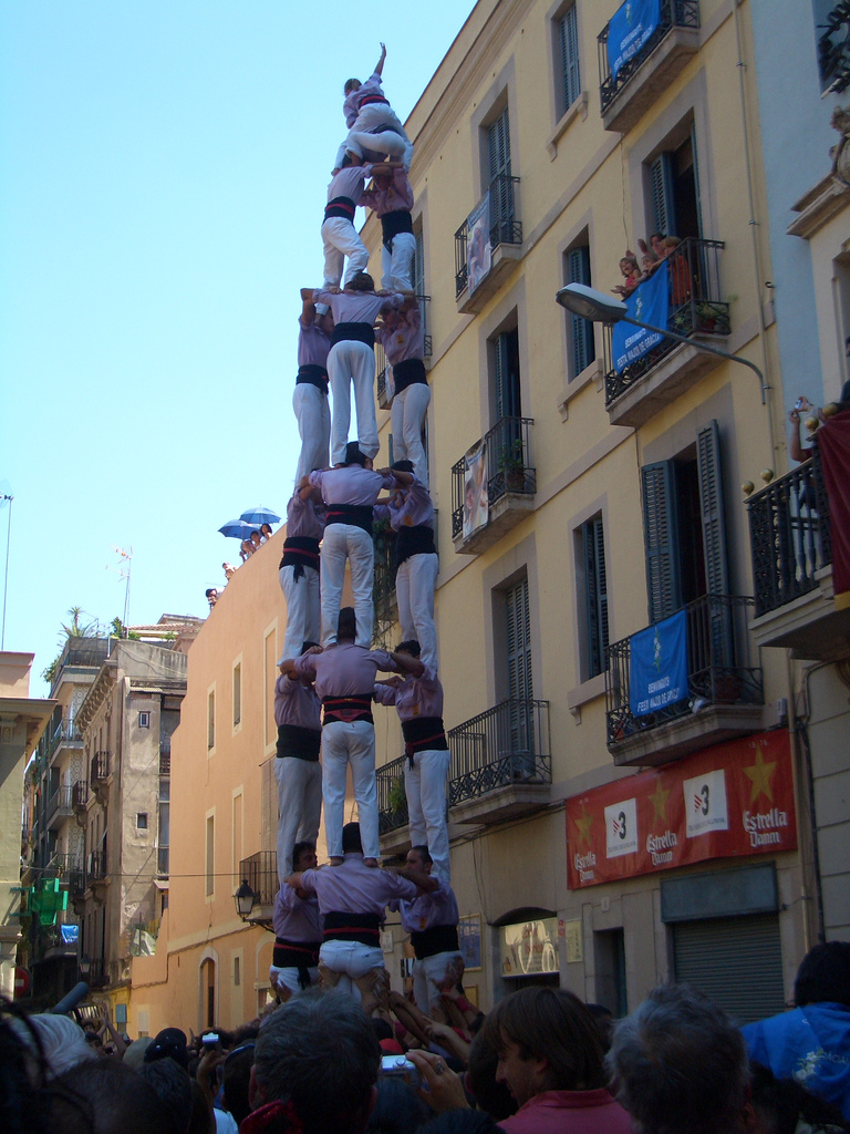 El Tres de Vuit malva